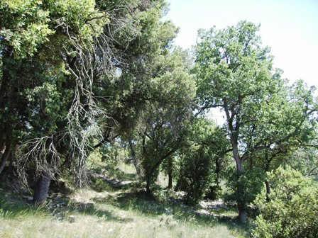 Image:Devesa_0010.JPG